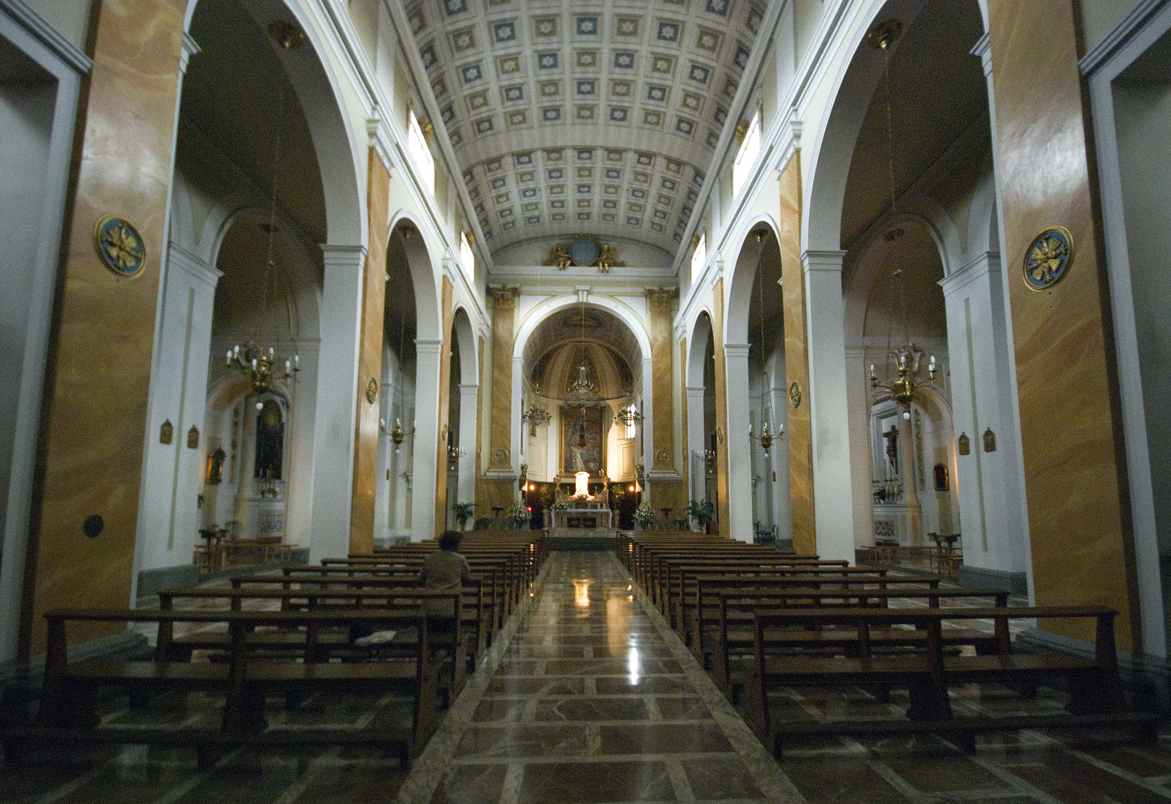 Collegiata di San Cassiano - Interno- San Casciano in Val di Pesa